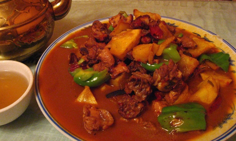 Dapanji as served in Urumqi.